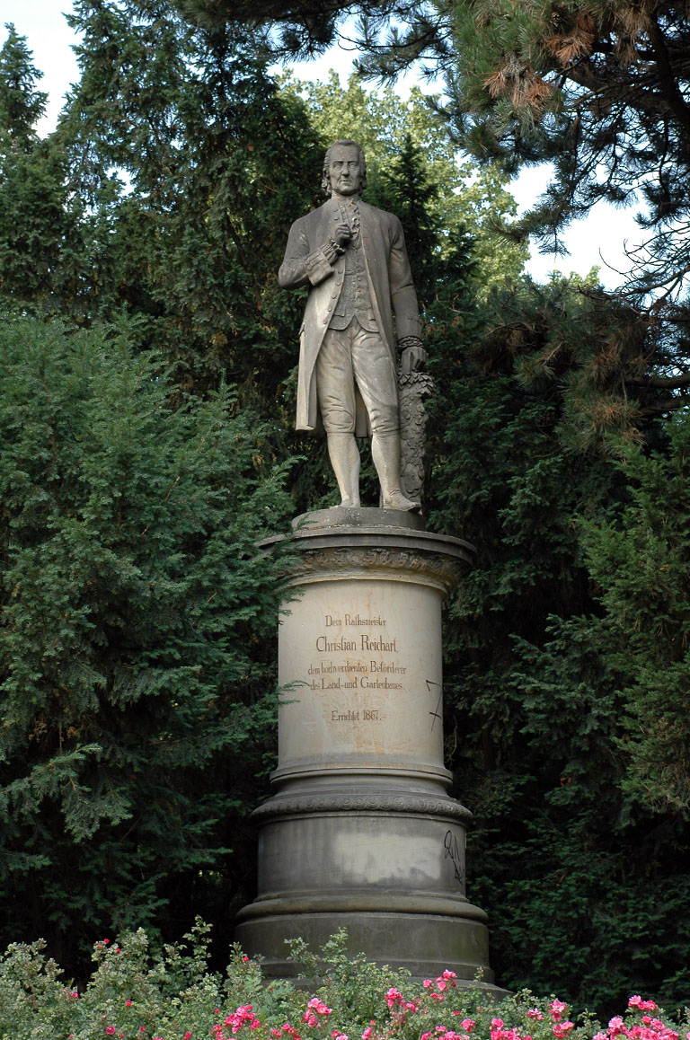 Denkmal für Christian Reichart (errichtet 1867), Begründer des Gartenbaus in Deutschland, in der Nähe der Pförtchenbrücke in Erfurt